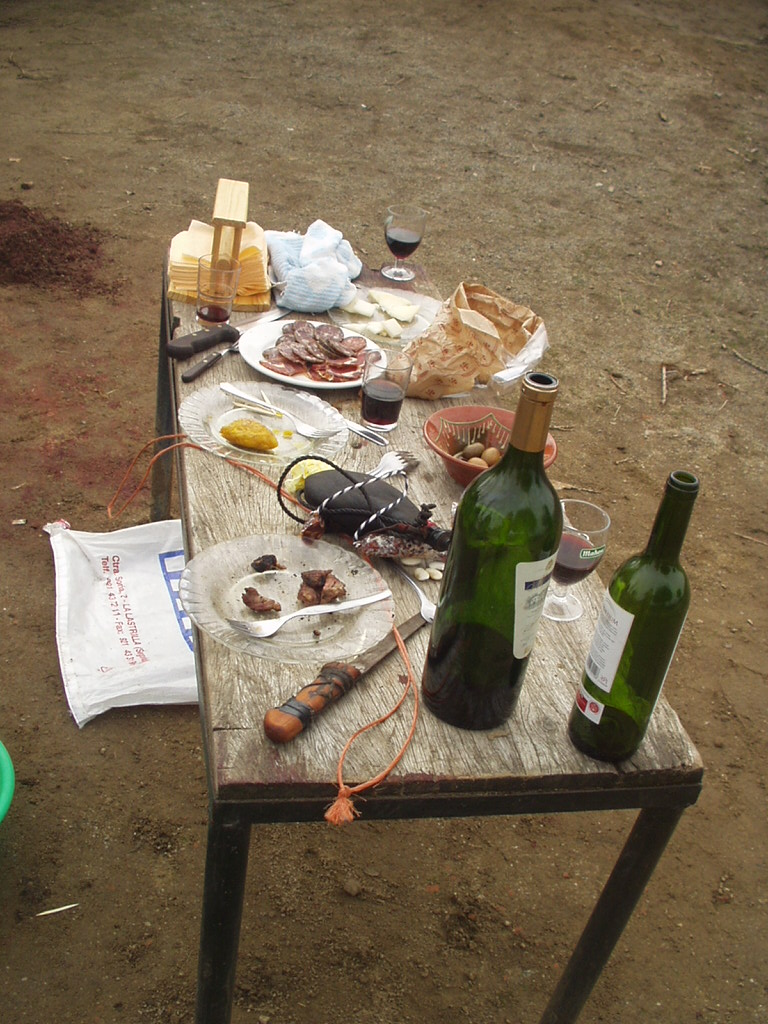 La moraga: 1. f. Manojo o maña que forman las espigadoras. 2. f. And. Acto de asar con fuego de leña y al aire libre frutas secas, sardinas u otros peces. 3. f. Rioja. Matanza del cerdo. Autor: Hortensia (Con permiso del autor)